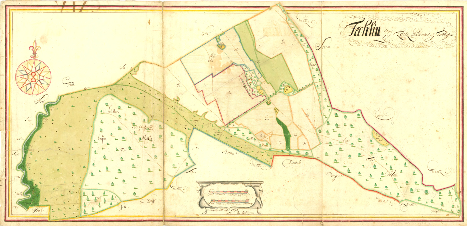 Matrikelkarte des Gutes Techlin bei Tribsees, entstanden anlaesslich der Landesvermessung von Schwedisch Pommern 1692 - 1709. Die Vermessung erfolgte durch den Fiskus, um Grundlagen für die Steuererhebung zu schaffen.